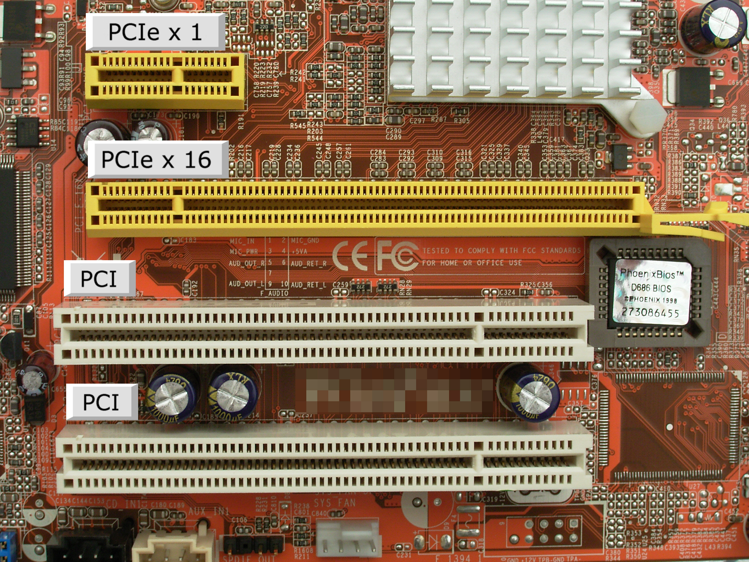 PCIe- und PCI-Slots im Vergleich